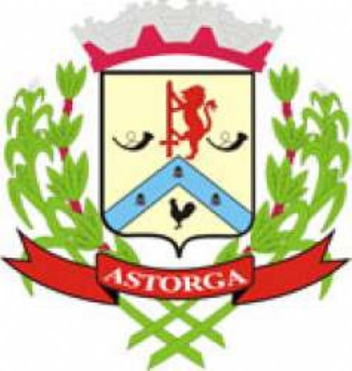 Brasão de Armas do município de Astorga - PR - Brasil.